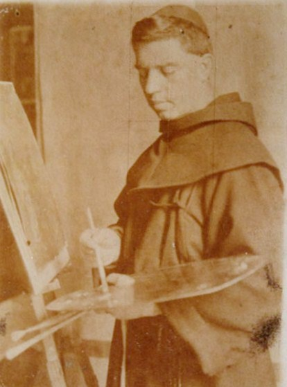 Fray Angélico Aranda pintando. Foto tomada en Roma, donde el sacerdote franciscano chileno estaba estudiando en la Academia Española